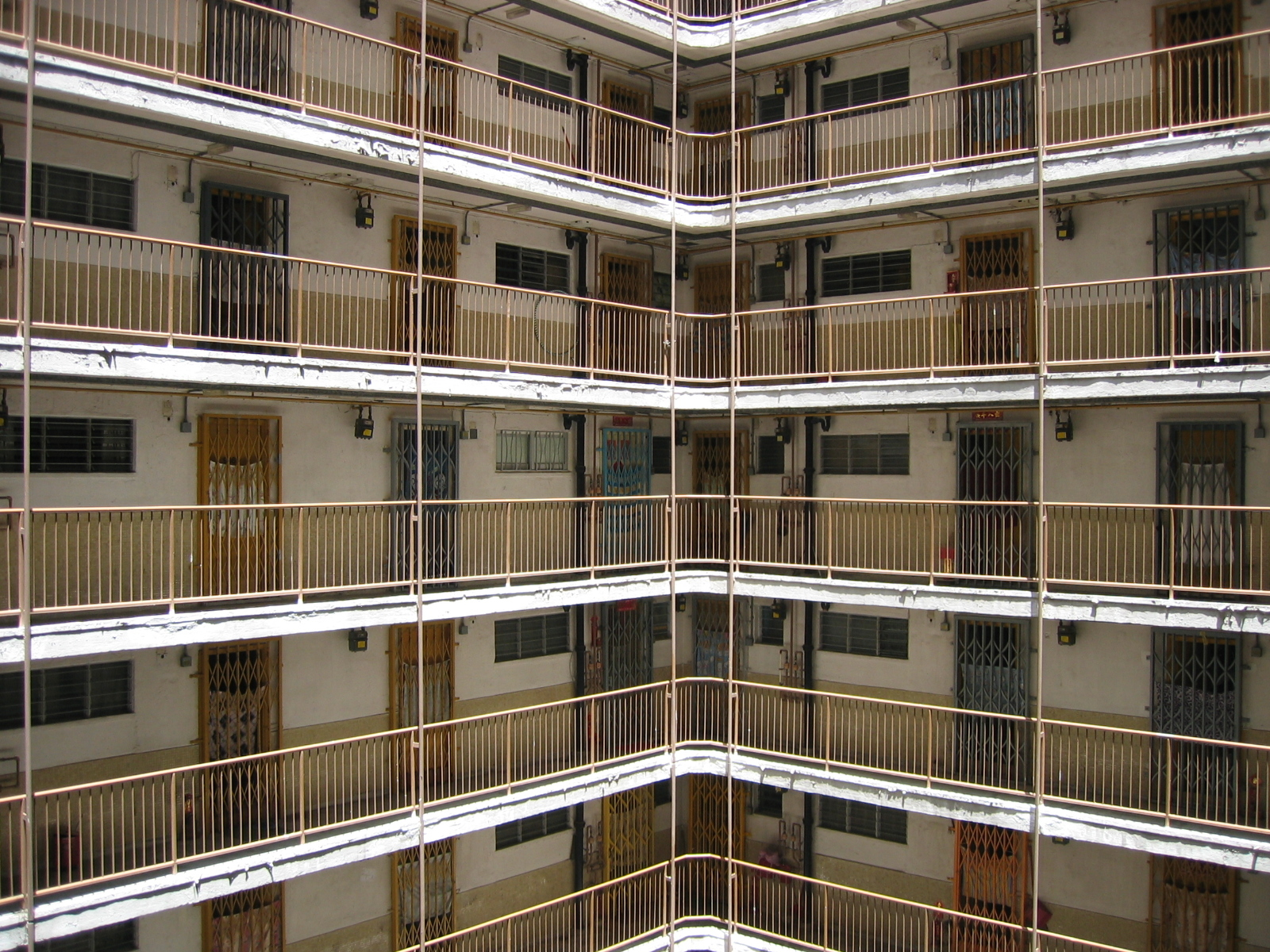 HK Sun Chui Estate Twin Tower Void 新翠邨雙塔式大廈